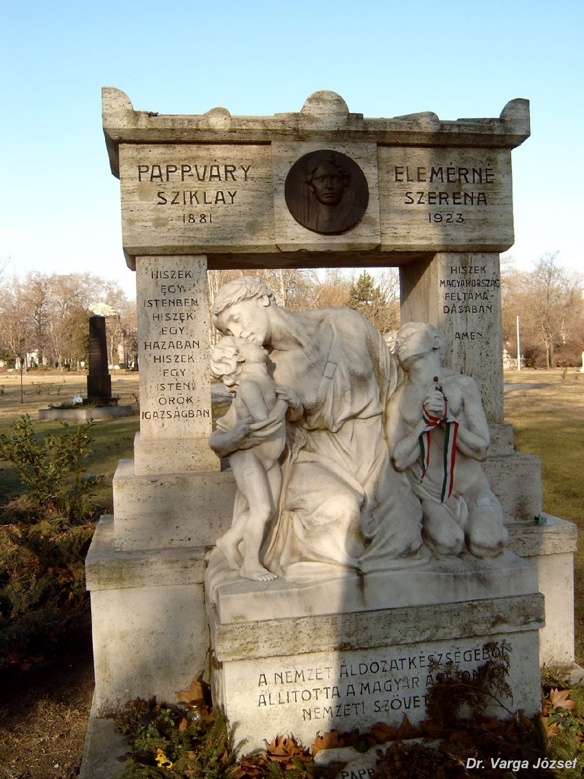 Papp-Váry Elemérné, Sziklay Szeréna (Rozsnyó, 1881. április 18. – Budapest, 1923. november 15 .) Papp-váry Elemér tábornok felesége. Az I. világháború idején több verseskötetet adott ki. Hitvallás c. irredenta versének első szakasza a Horthy korszak „nemzeti imája” volt. Szabados Béla zenésítette meg. Kerepesi temető: 28-díszsor-37 [szobrász: Horvay János]